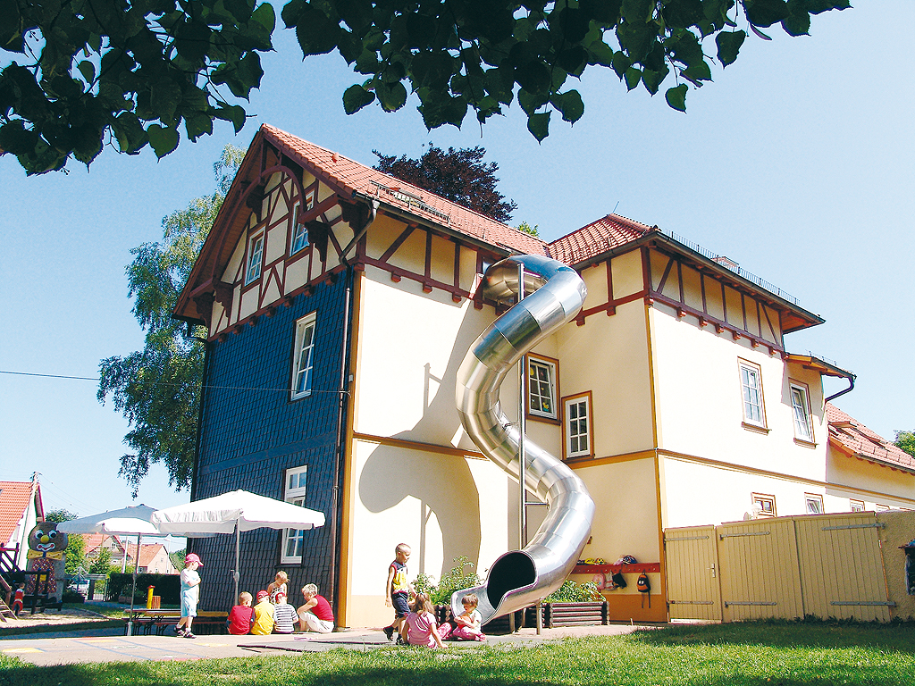 Evakuierungsrutsche im Fröbelkindergarten in Sonneborn Kreis Gotha.